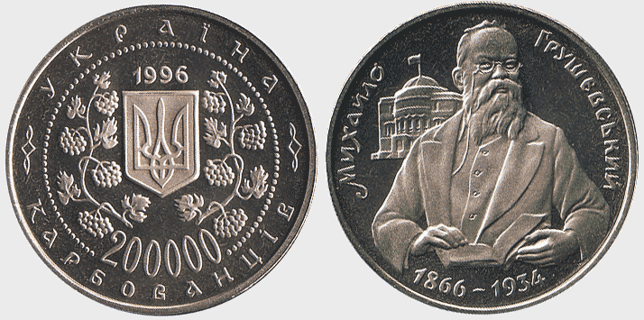 Михайло Грушевський на тлі Київського міського будинку вчителя (монета України в 200.000 карбованців 1996 року, колекція монет Деми Юрія).